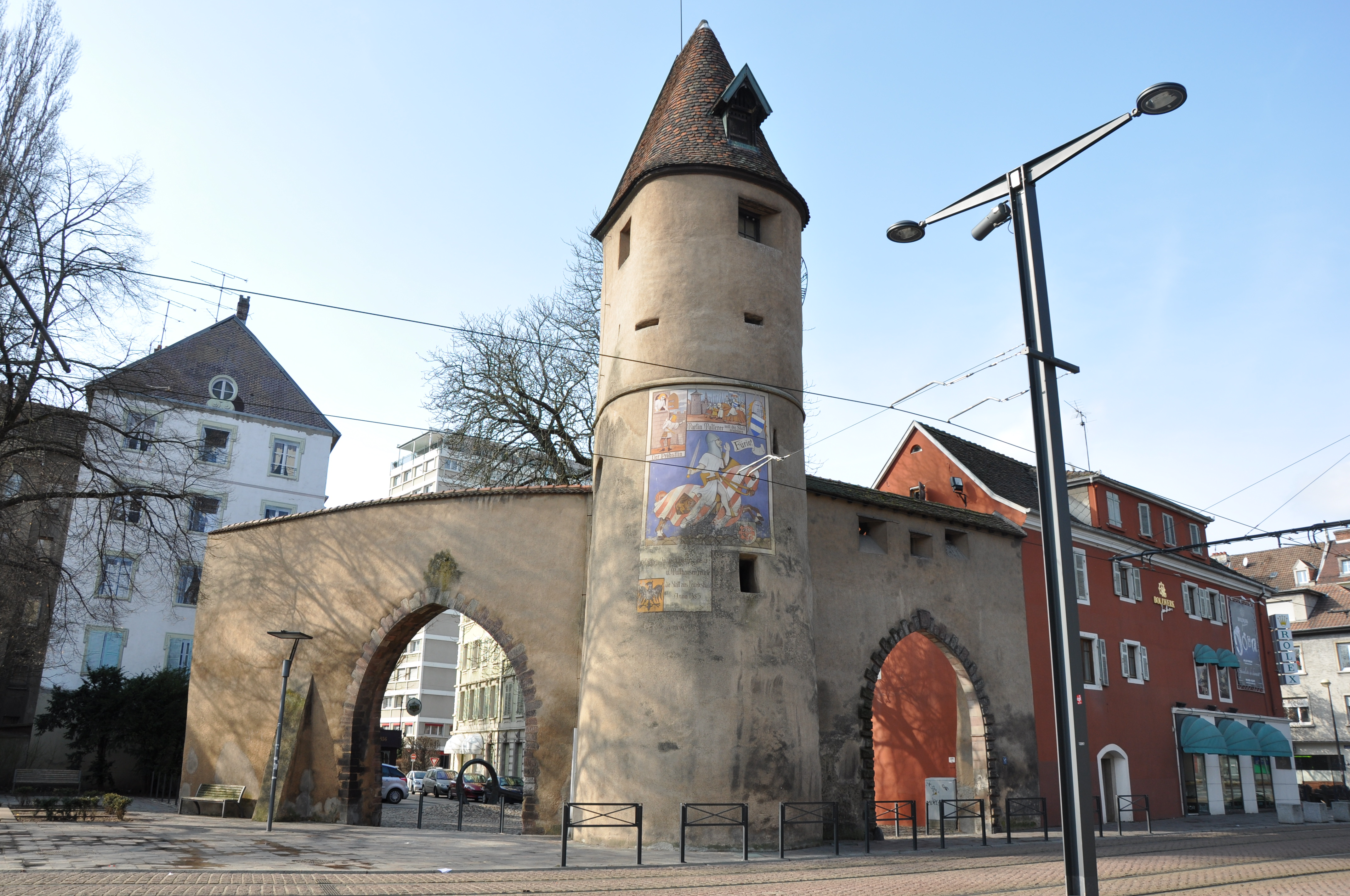 Bollwerk